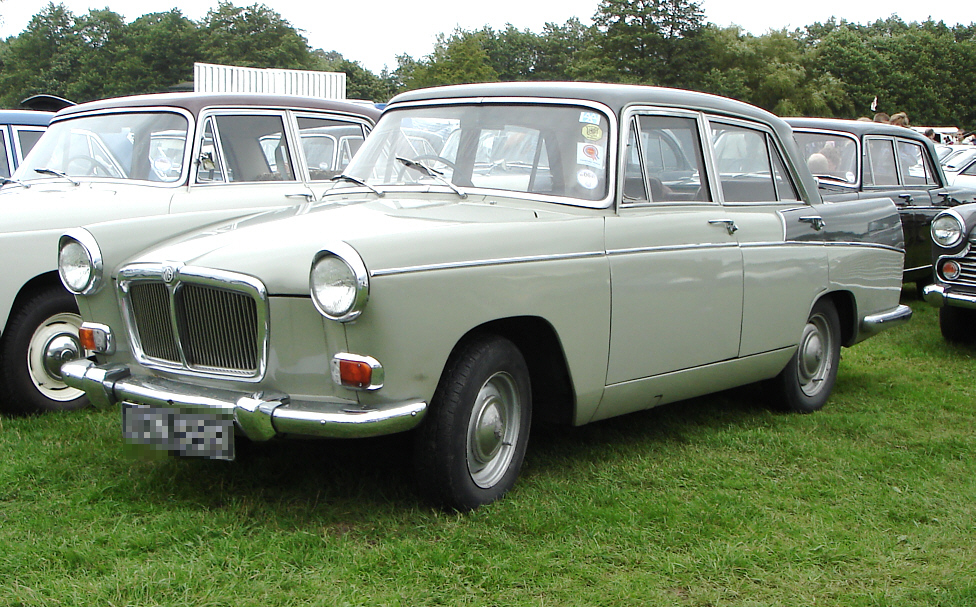 MG Magnette MkIII 1960